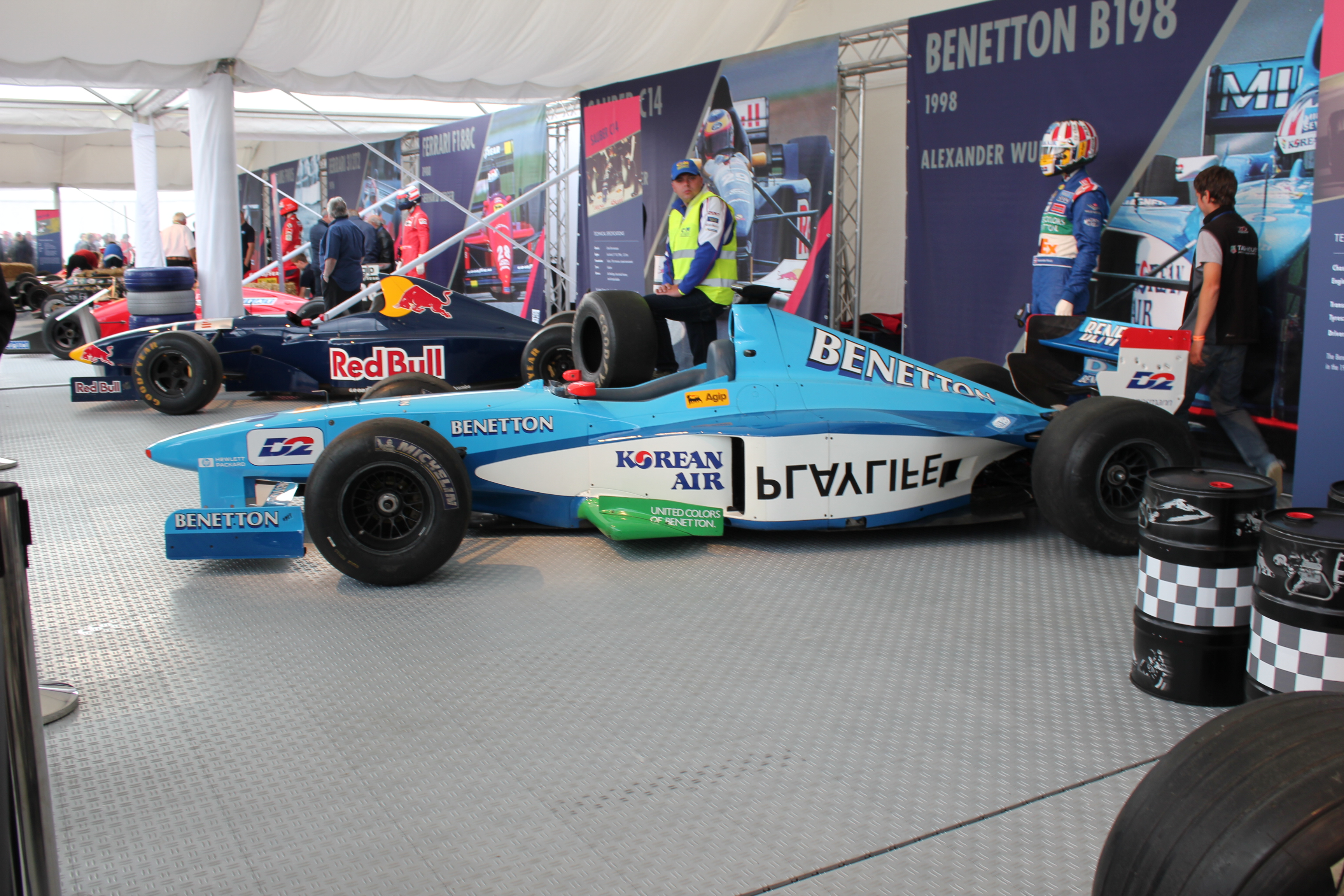 Ein Benetton B198 von der Seite (dahinter ein Sauber C14)